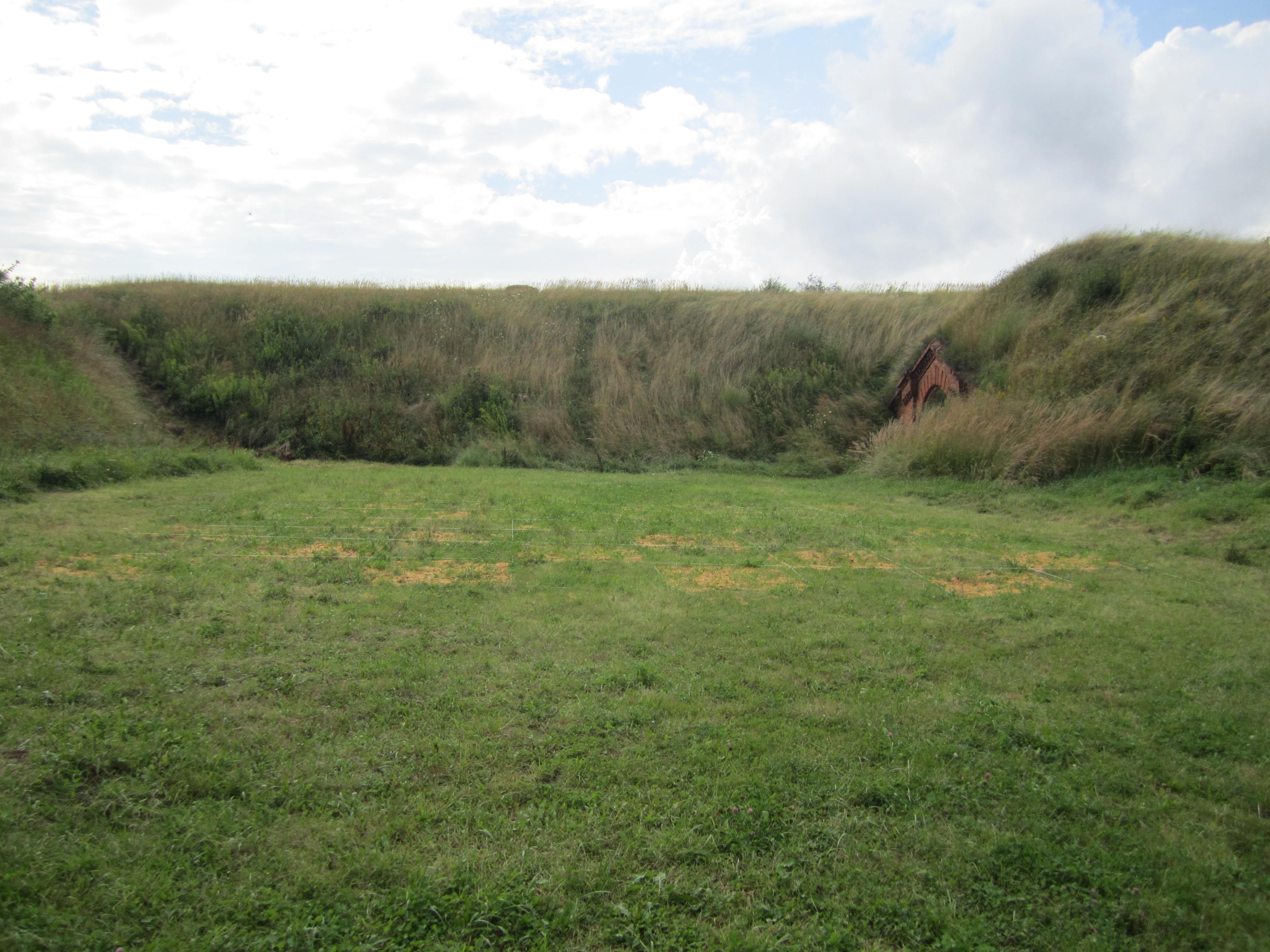 גיא ההריגה בפורט התשיעי